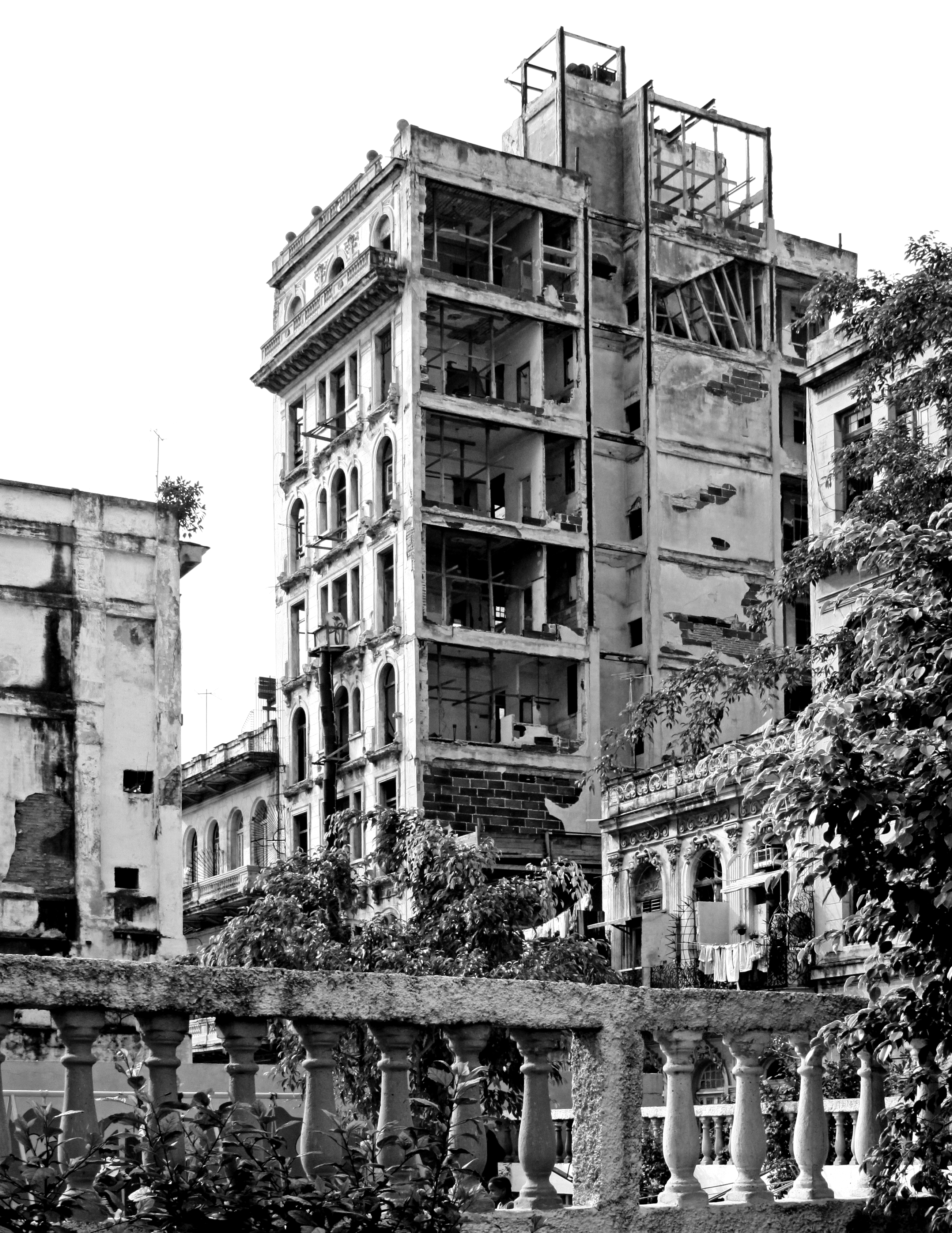 Havana Building bw